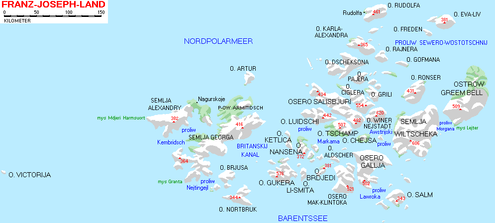 Karte des Franz-Joseph-Lands im Arktischen Ozean)